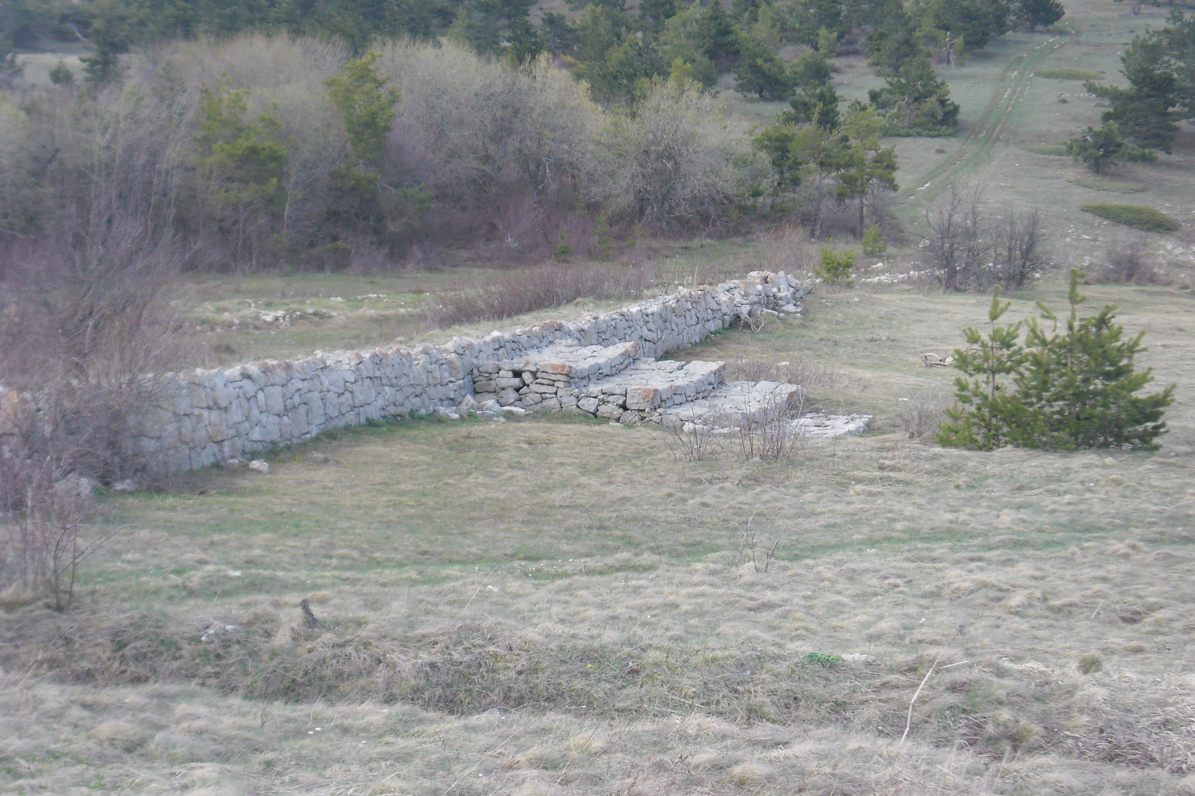 Паркан і сходинки на Ялтинській яйлі